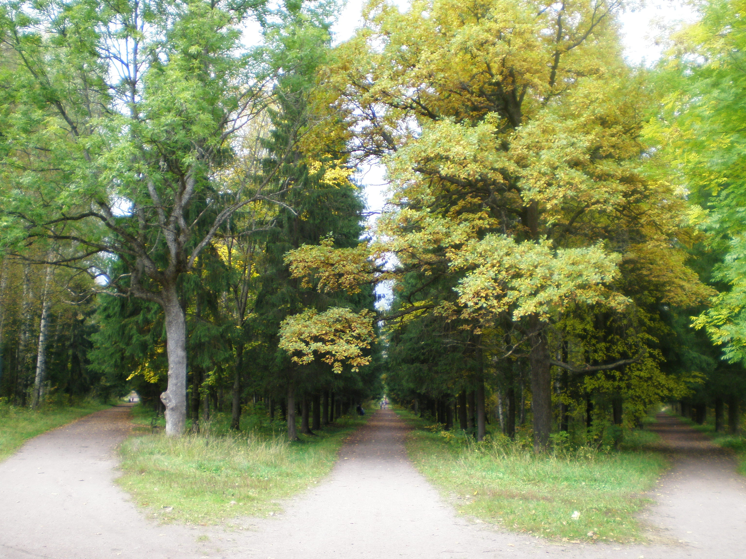 Три аллеи в парке Сильвия